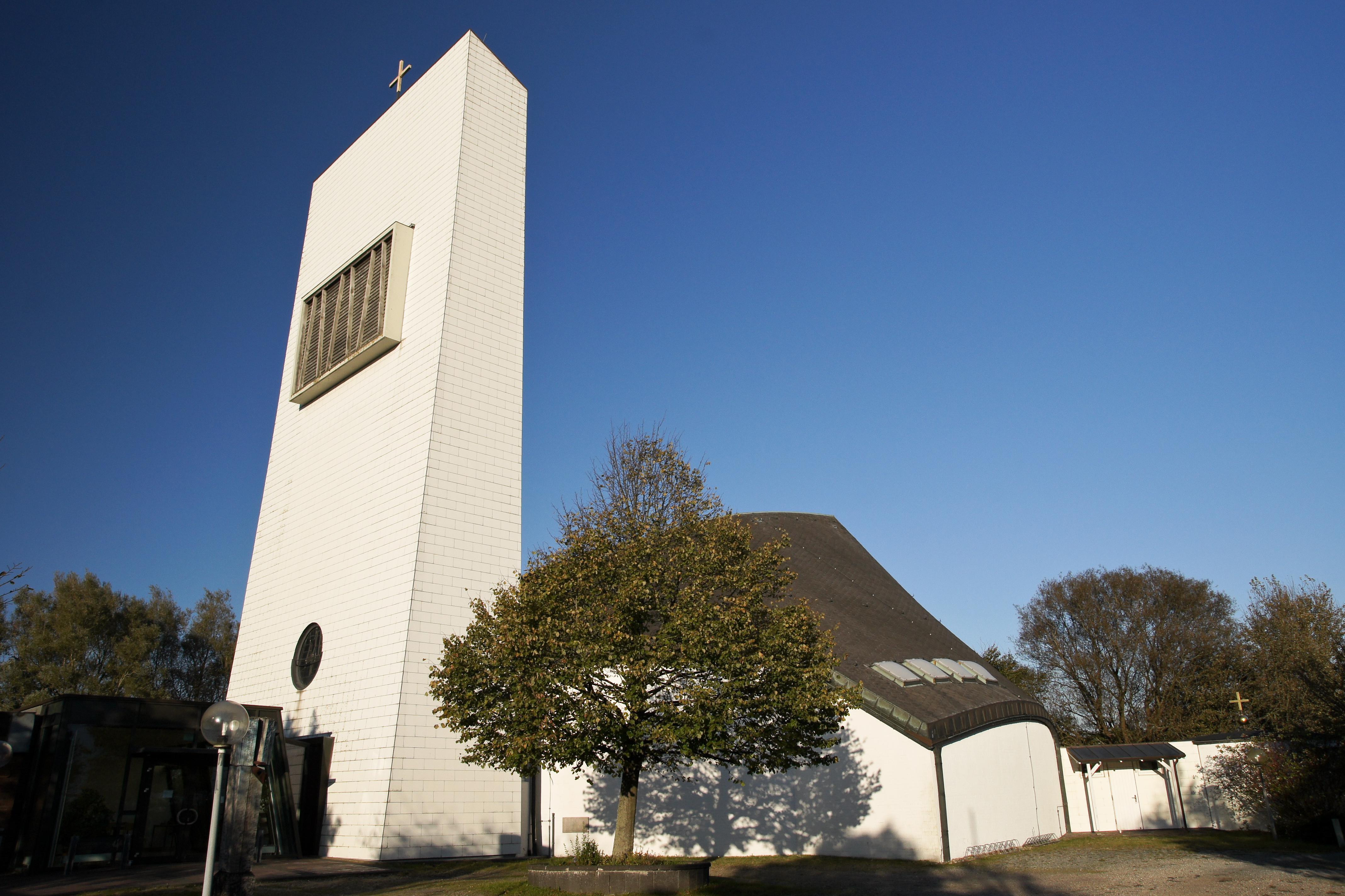 Flensburg-Weiche, An der Friedenskirche 4, Friedenskirche, Denkmal Nr. 1